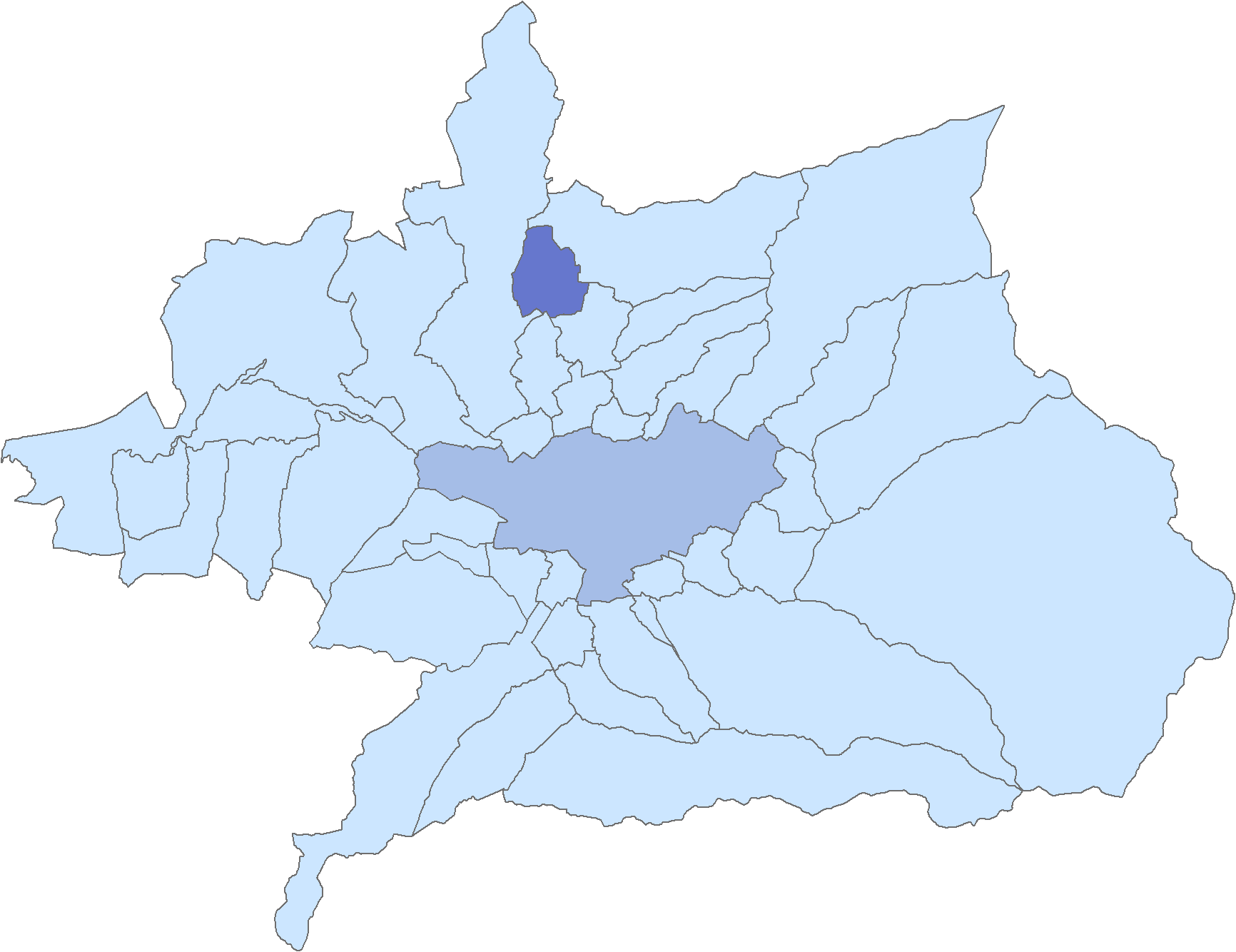 Situación del municipio de Calicasas respecto a la comarca de la Vega de Granada, en España.